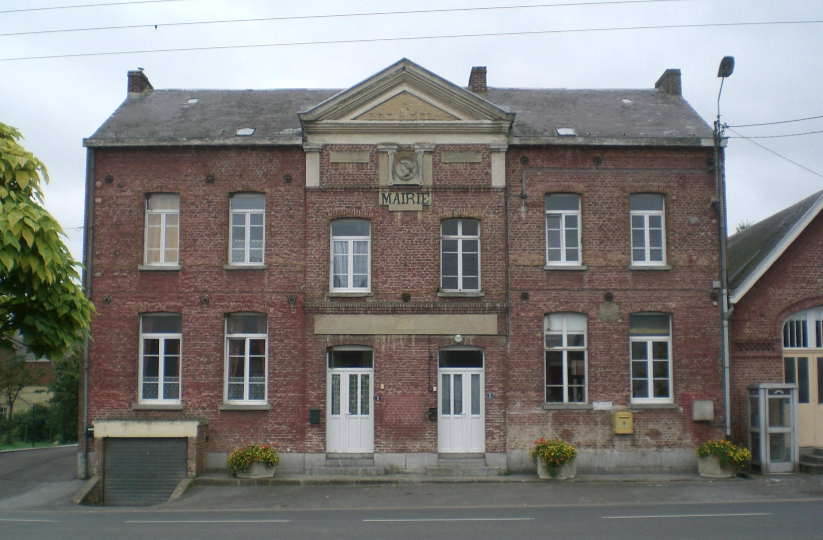 mairie de ramousies